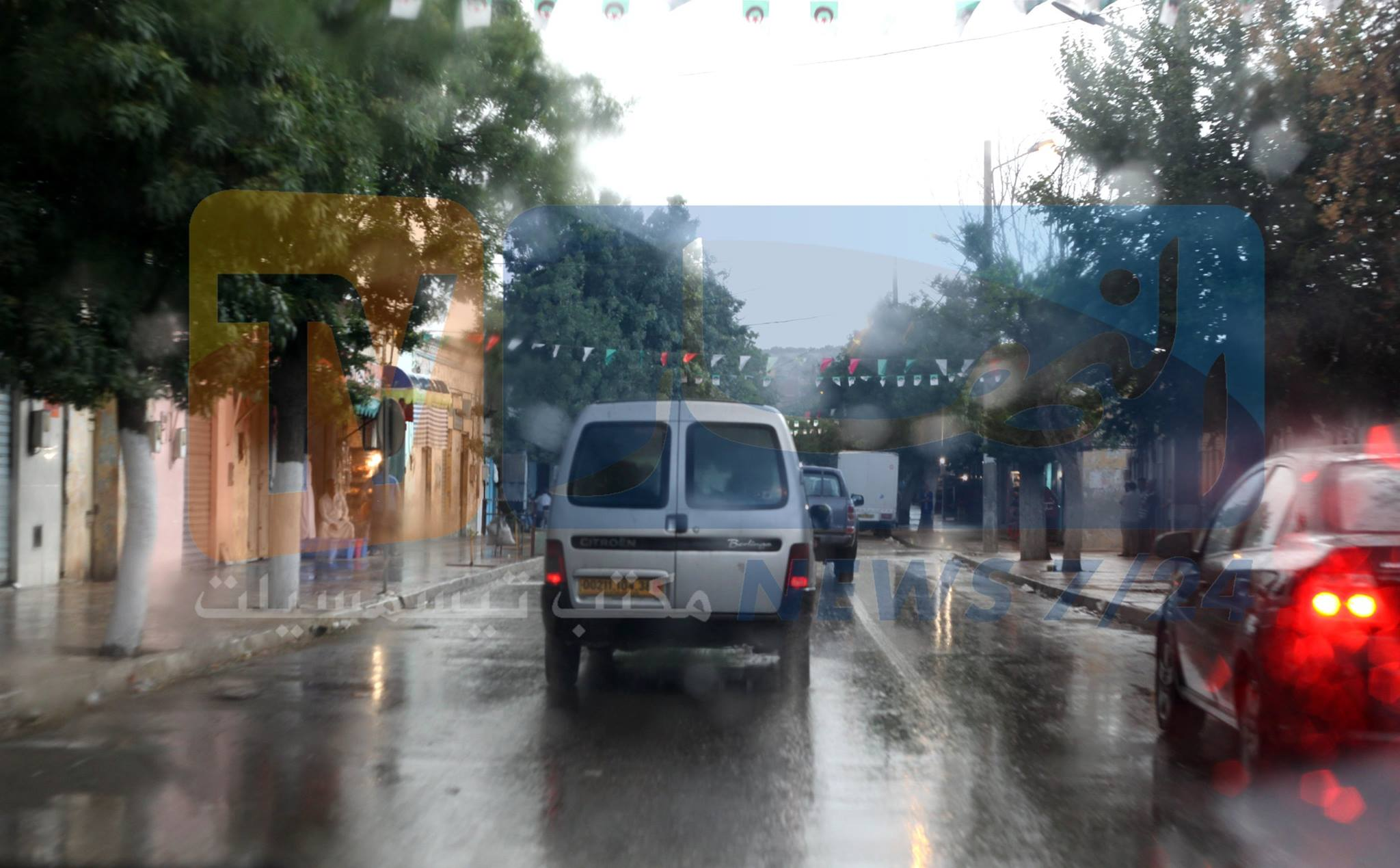 جمميلة ورائعة تيسمسيلت